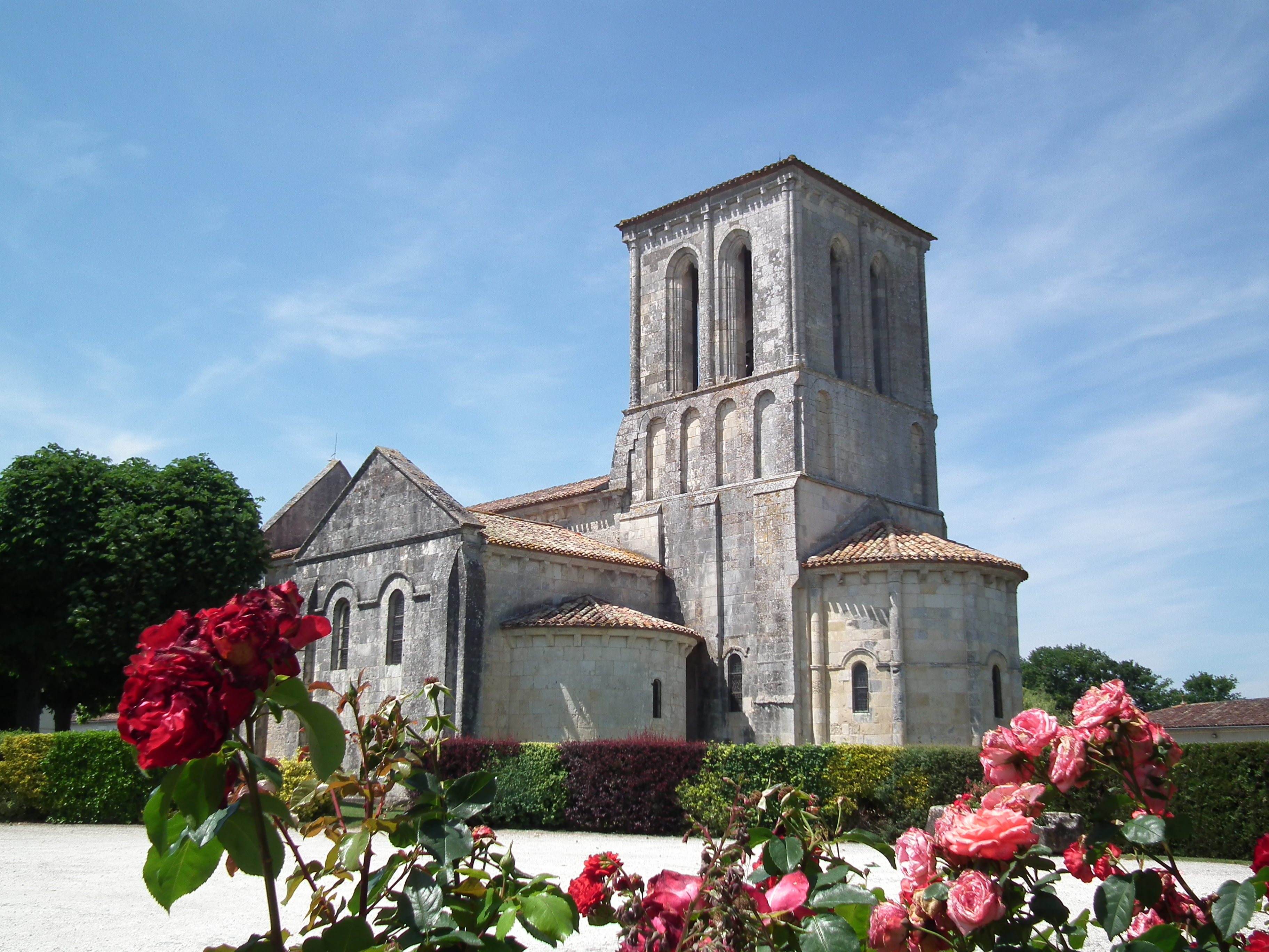 L'église romane de Tanzac